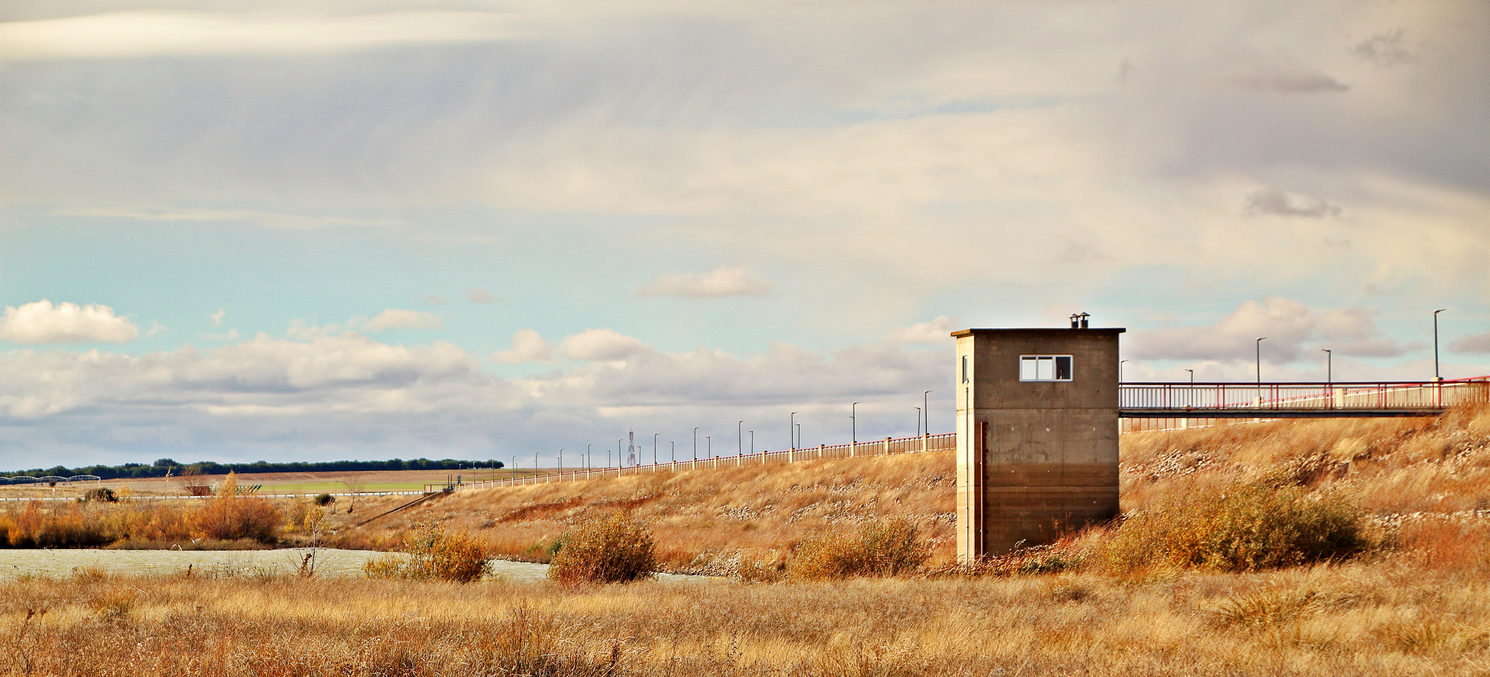 El Campo de Peñaranda municipio de la comarca Tierra de Peñaranda, provincia de Salamanca.